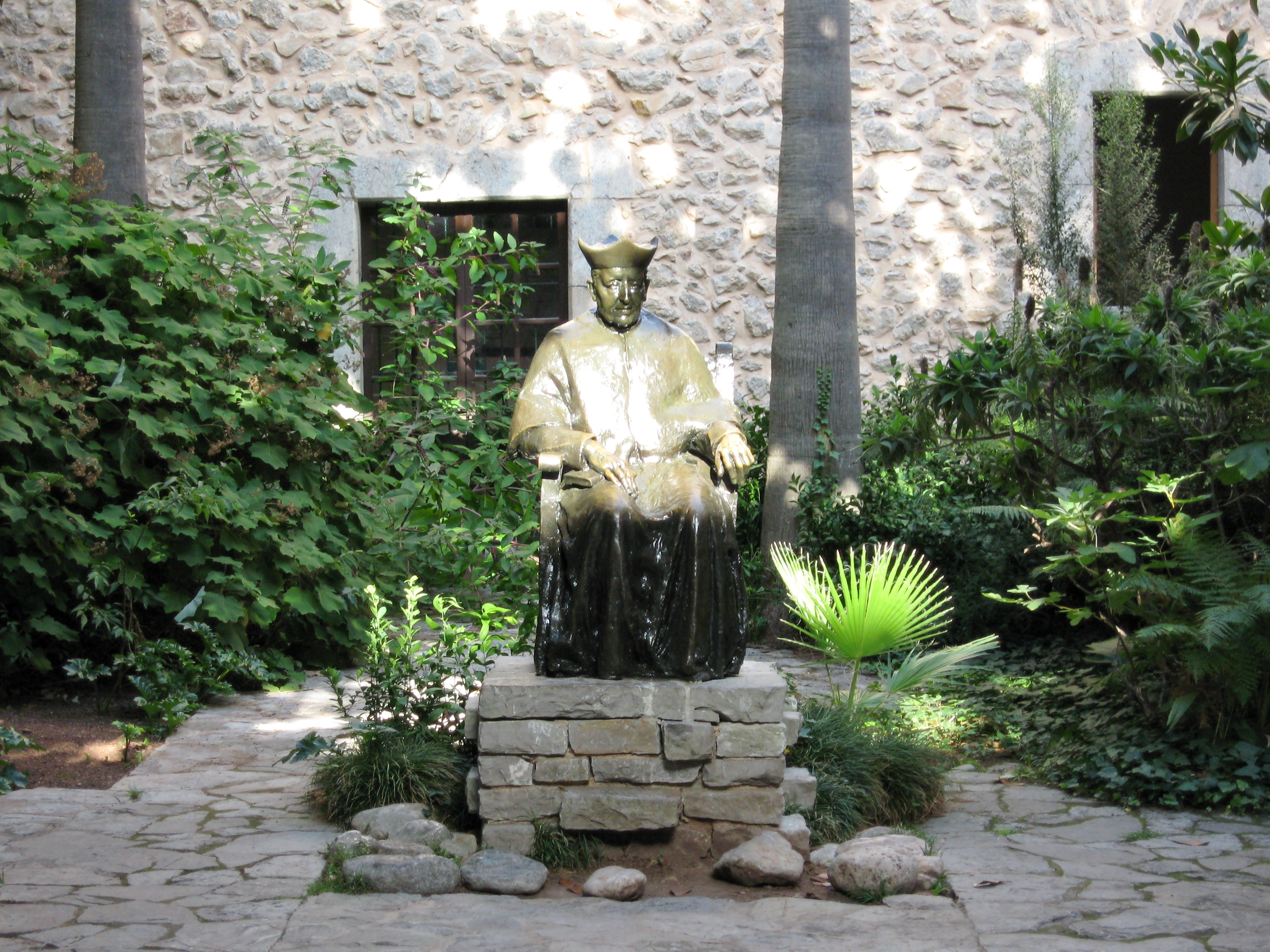 Santuari de Lluc, Gemeinde Escorca, Mallorca, Spanien